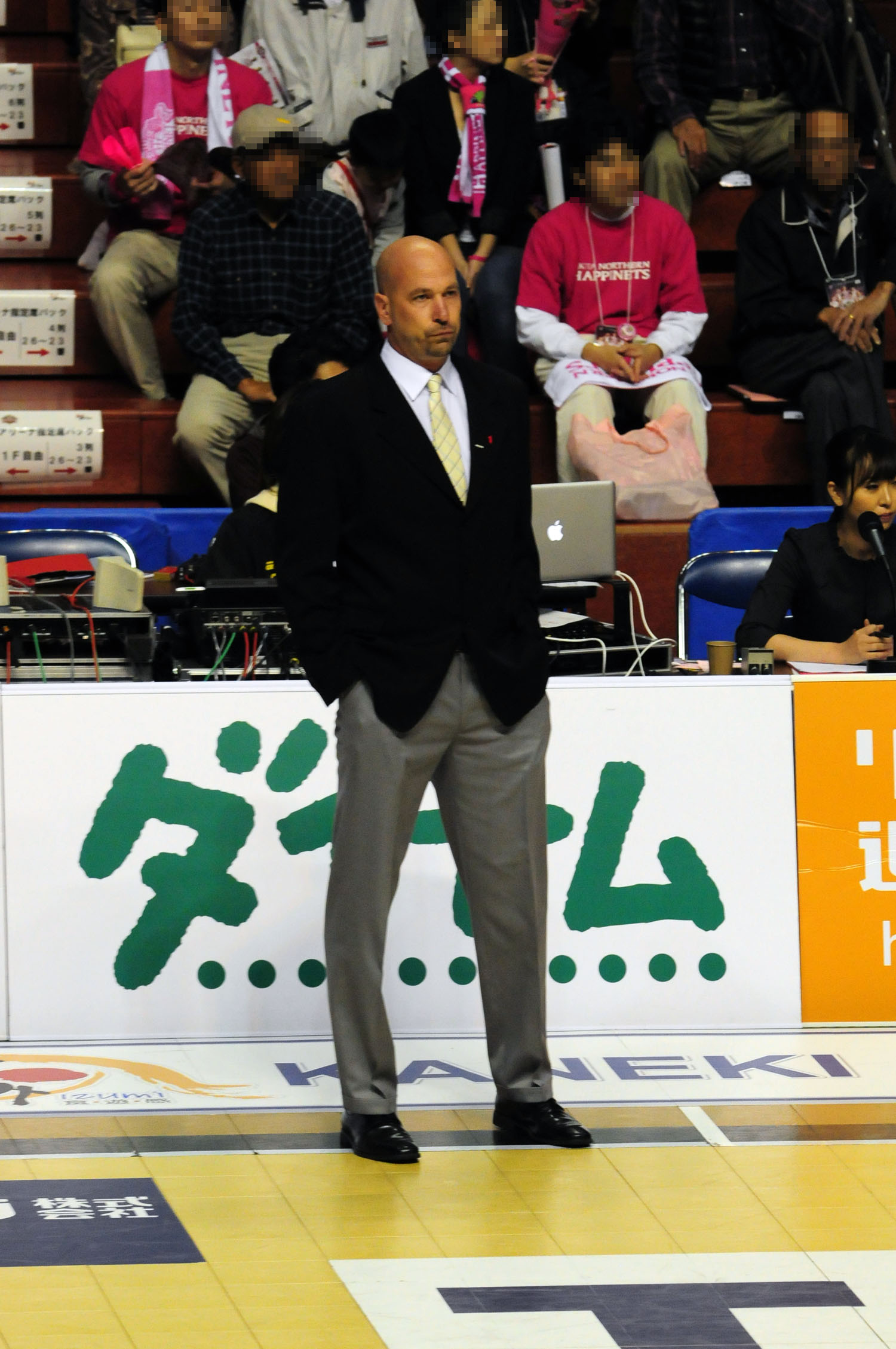 千葉ジェッツ、エリック・ガードーヘッドコーチ。秋田市立体育館で。